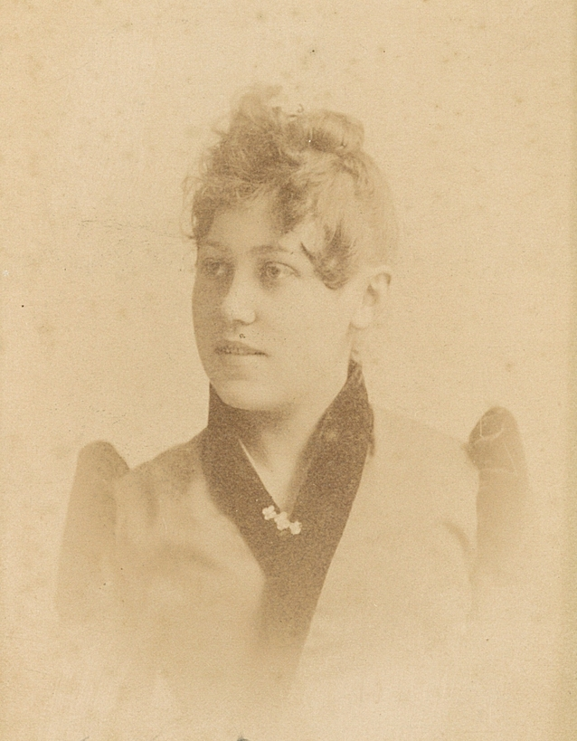 Julie Lampe, 1891